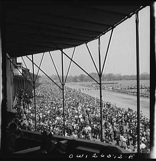 Die Haupttribüne der Pferderennbahn von Pimlico bei Baltimore, Maryland, 1943. Aus der Library of Congress Pimlico racetrack, near Baltimore, Maryland. Looking from grandstand at Pimlico. Siegel, Arthur S., photographer. CREATED/PUBLISHED 1943 May. NOTES Title and other information from caption card. Transfer; United States. Office of War Information. Overseas Picture Division. Washington Division; 1944. SUBJECTS Nitrate negatives. United States--Maryland--Baltimore. MEDIUM 1 negative : nitrate ; 2 1/4 x 2 1/4 inches or smaller. CALL NUMBER LC-USW3- 026512-E REPRODUCTION NUMBER LC-USW3-026512-E DLC (b&w film nitrate neg.) PART OF Farm Security Administration - Office of War Information Photograph Collection (Library of Congress) REPOSITORY Library of Congress Prints and Photographs Division Washington, D.C. 20540 DIGITAL ID (intermediary roll film) fsa 8d29224